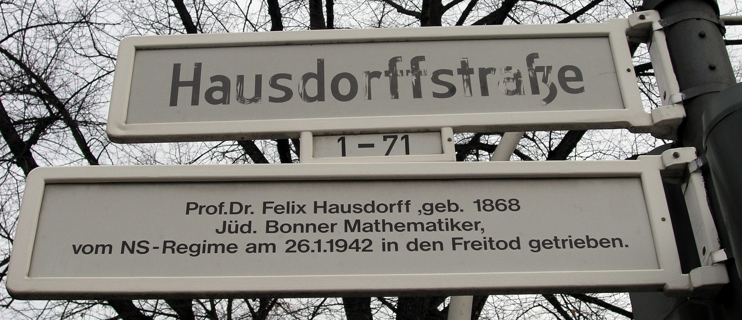 Hausdorff-Straße, Bonn, 2004